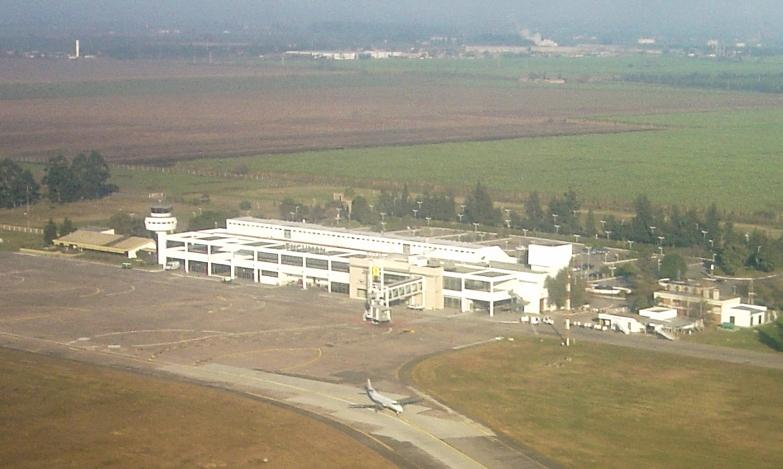 Benjamin Matienzo International Airport, Tucumán, Argentina